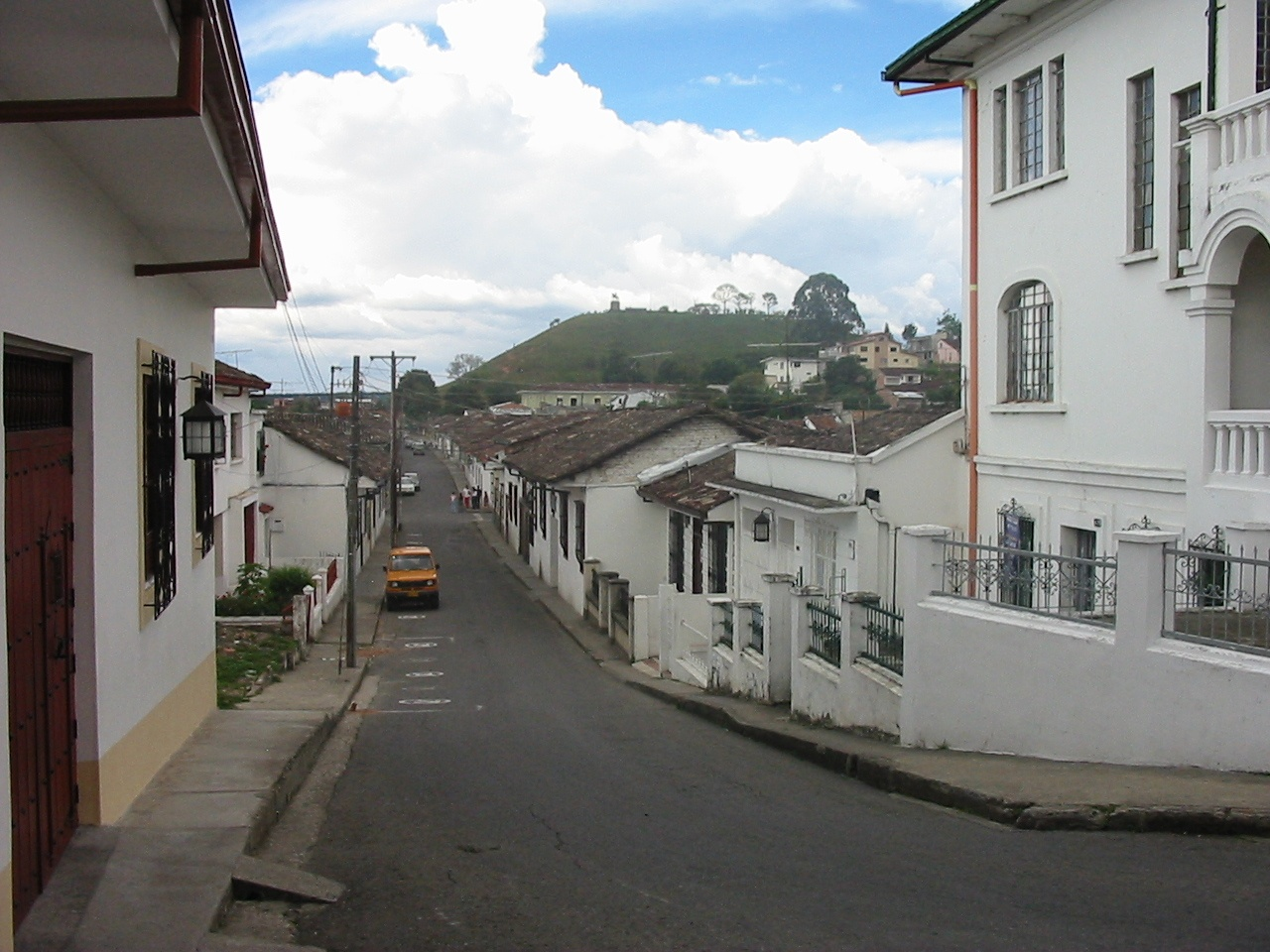 El Morro enPopayán-Colombia